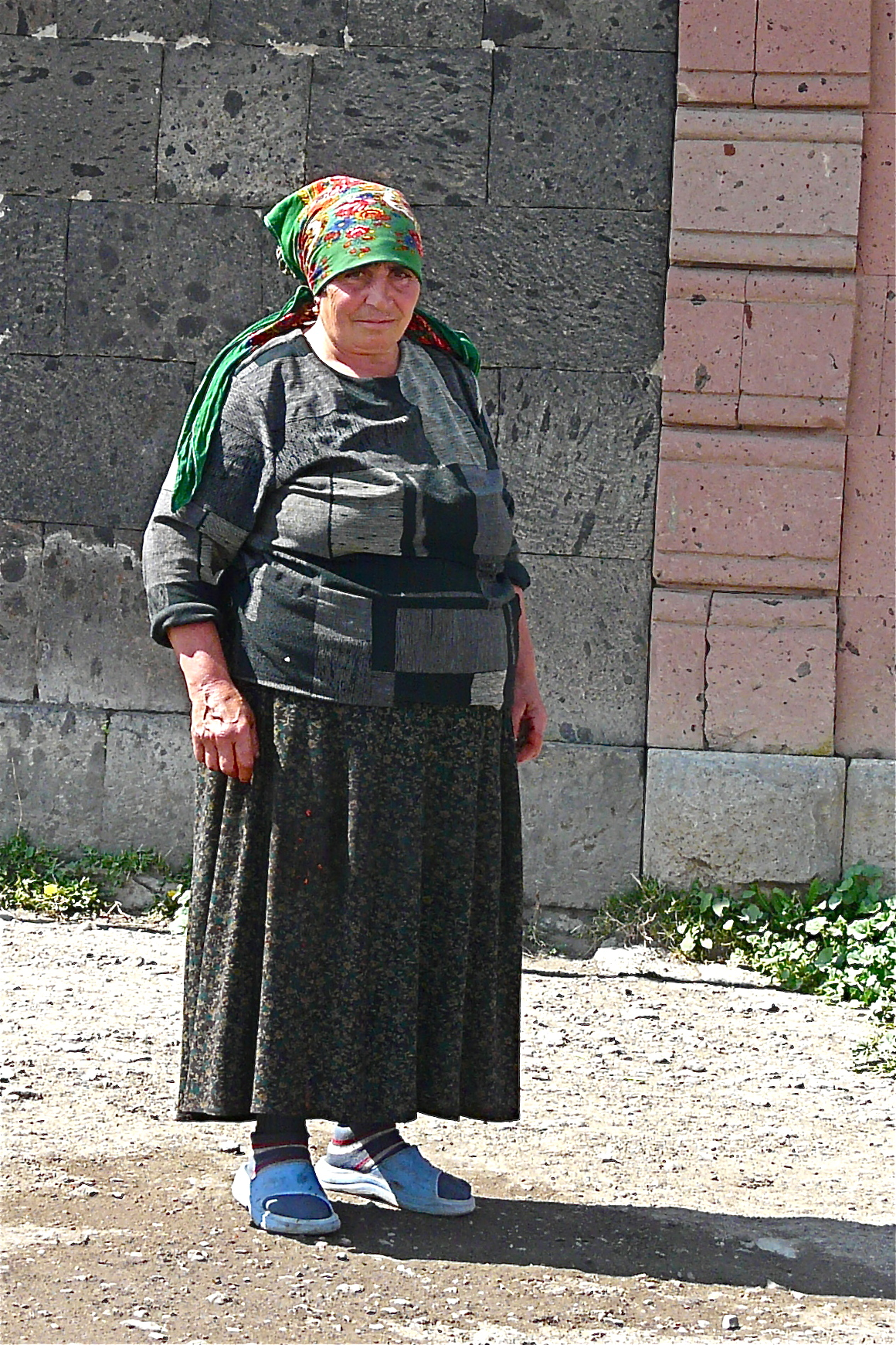 Wandeling door het dorpje Rya Taza.